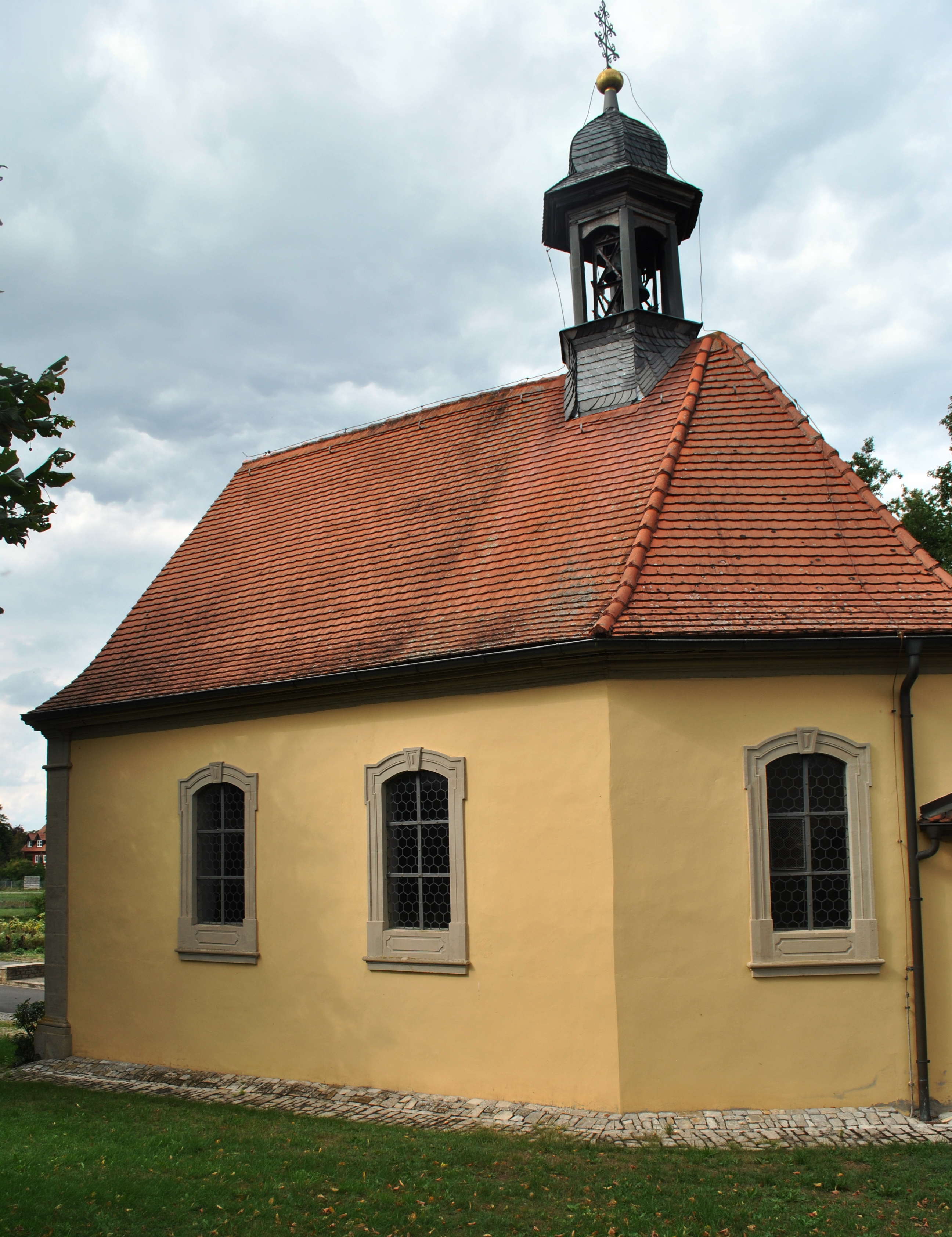 Katholische Filialkirche St. Barbara kleiner Saalbau mit polygonalem Chorabschluss und Dachreiter, bezeichnet 1771; mit Ausstattung; östlicher Anbau, 1954This is a photograph of an architectural monument.